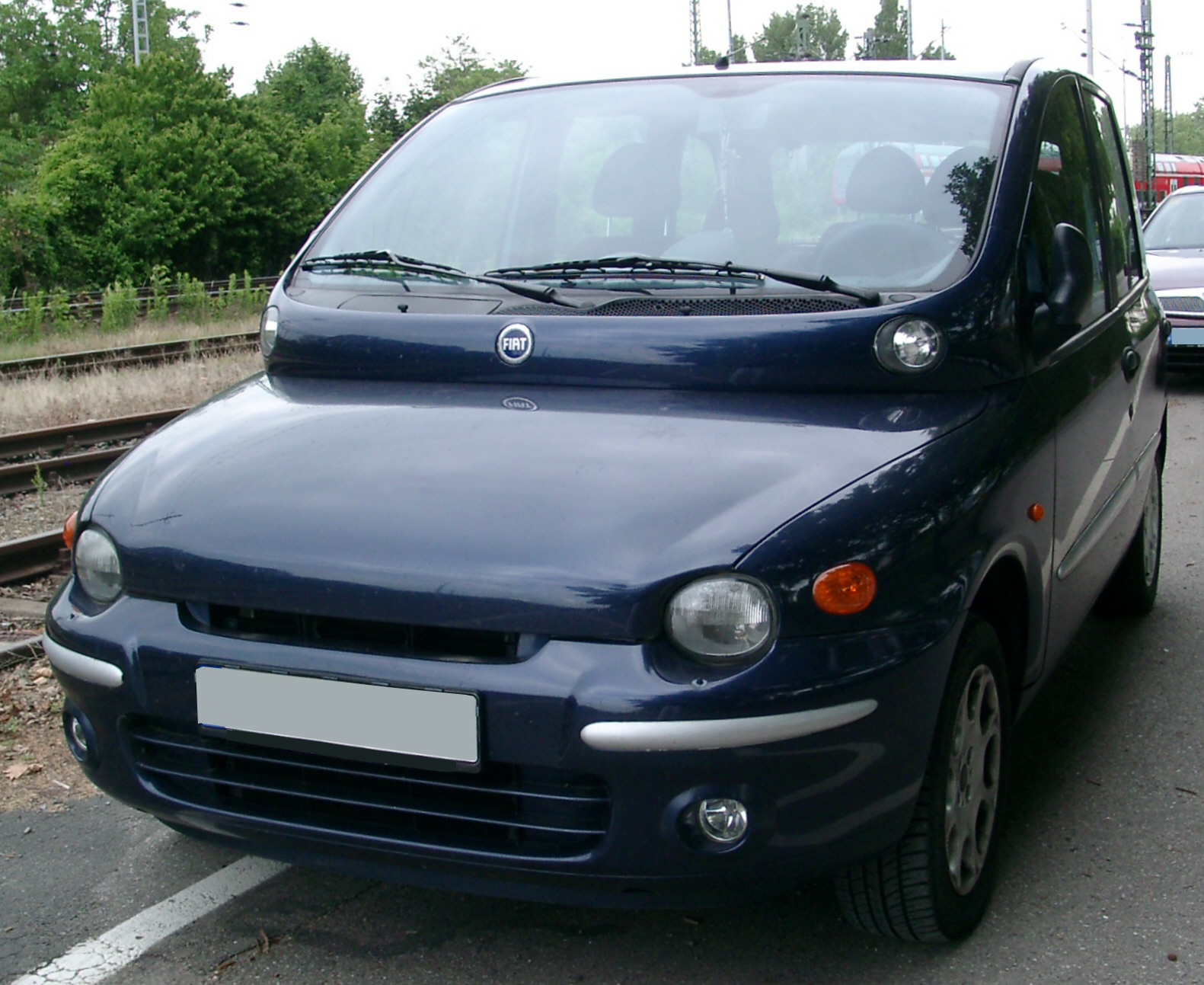 Fiat Multipla, 1. Generation